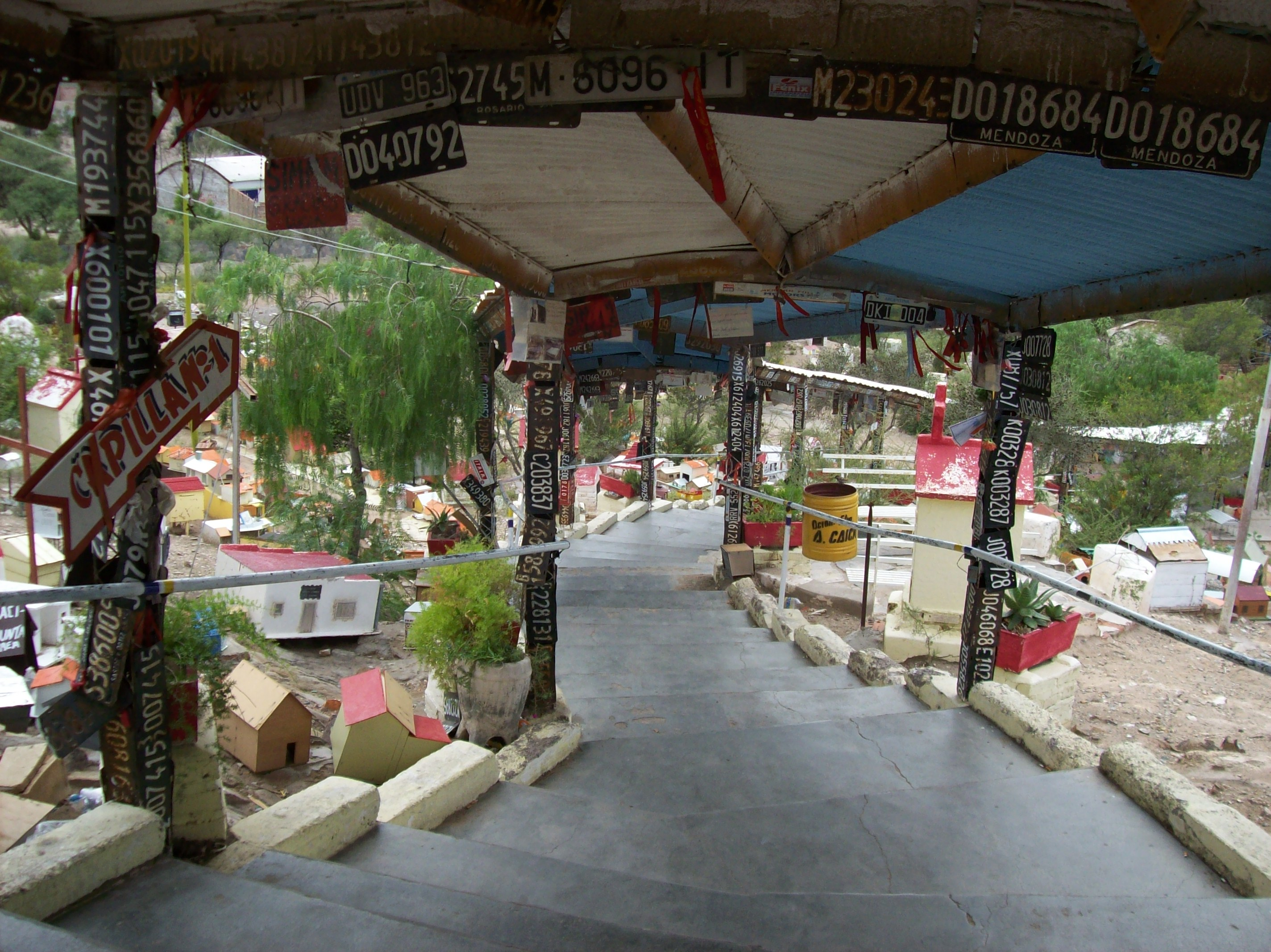 Escalera y representaciones de casas en el Santuario de la Difunta Correa, en Vallecito, Departamento Caucete, Provincia de San Juan, Argentina.